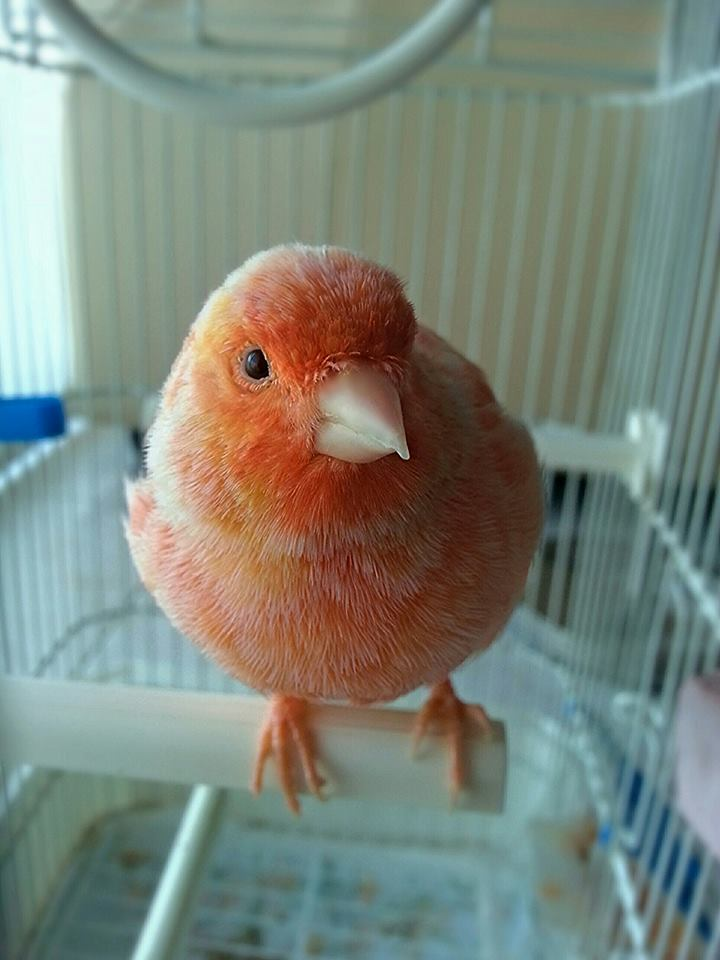 Canario doméstico